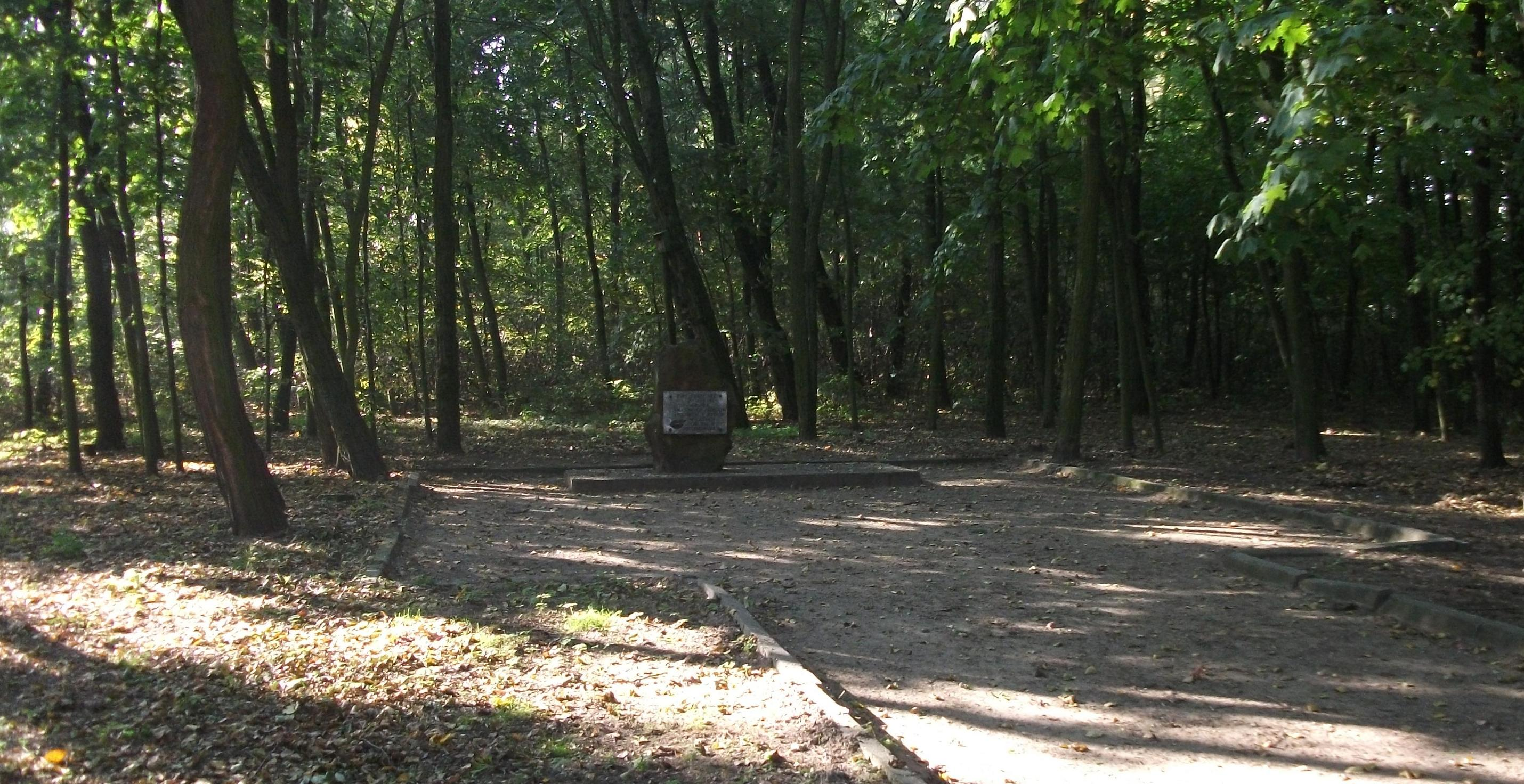 Teren byłego cmentarza żydowskiego w Wieluniu